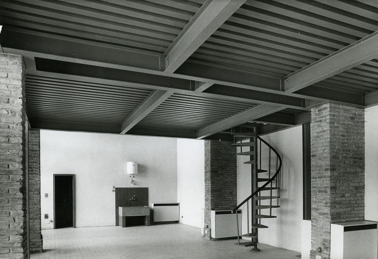 Servizio fotografico : Ferrara, 1975 / Paolo Monti. - Stampe: 6 : Positivo b/n, gelatina bromuro d'argento/ carta, 18x24, 24x30. - ((Al verso di due stampe iscrizione manoscritta: "Ferrara - Palaz - Diamanti/ 3582/5" e "Camera dormitori - Collegi/ prov - Marco Zanuso - Cini BoeriLa suddetta serie è contenuta nella scatola identificata con la numerazione 136. Sul coperchio della scatola manoscritto: "t. 02/34.909.65/ Paolo Monti/ Corso sempione 28/ 20154 Milano/ Procida - 1"